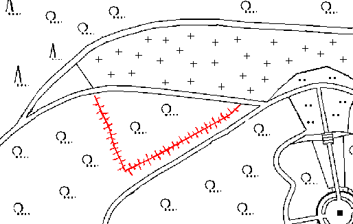 Skizze der erhaltenen Teile der Wallanlage in Remscheid-Reinshagen (rot). Nördlich der Friedhof, südwestlich das Ehrenhain.